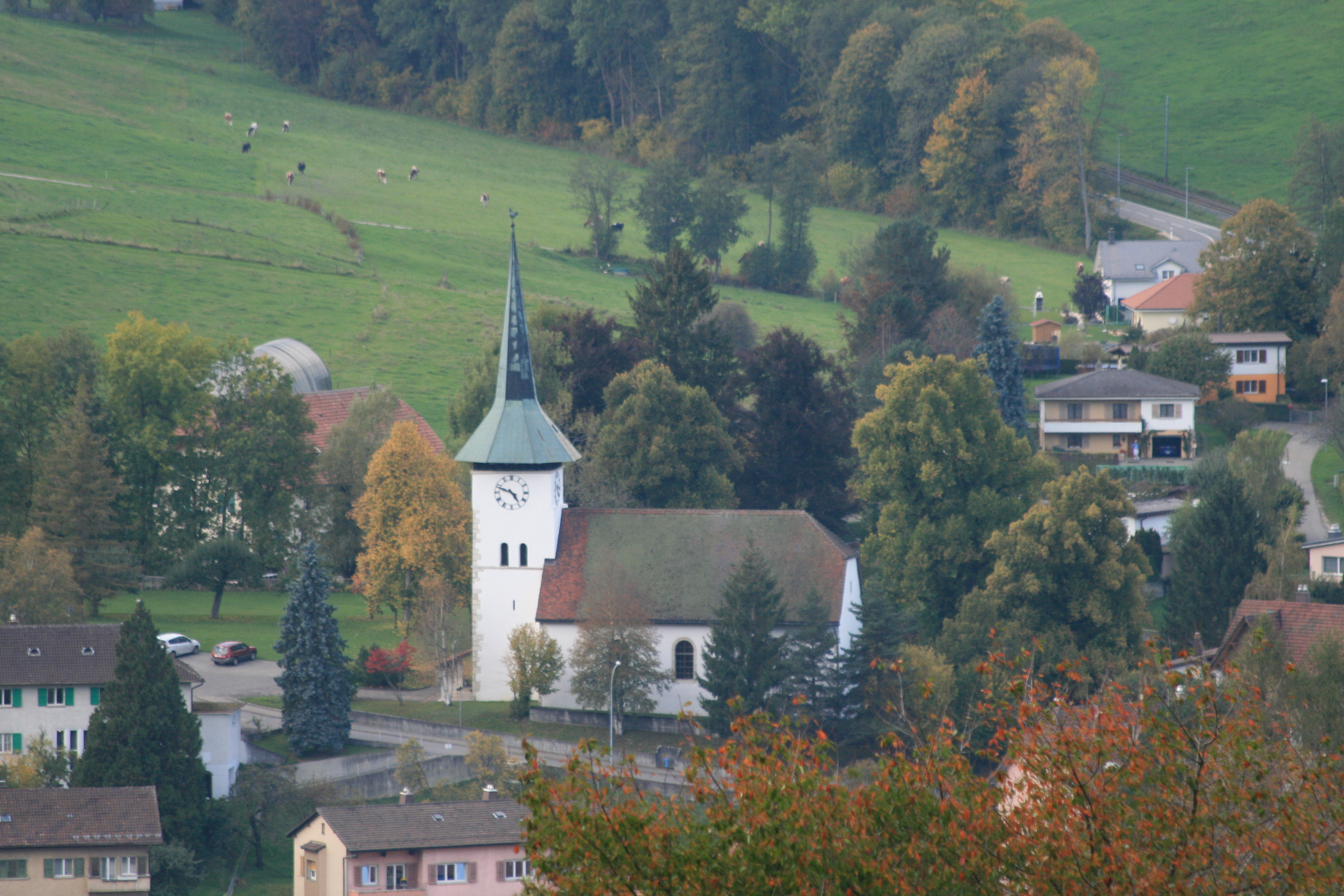 Tavannes